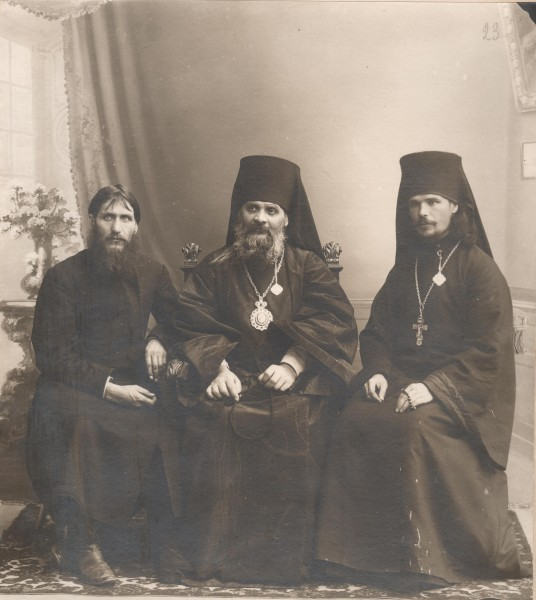 Григорий Распутин, епископ Гермоген (Долганёв), иеромонах Илиодор (Труфанов)